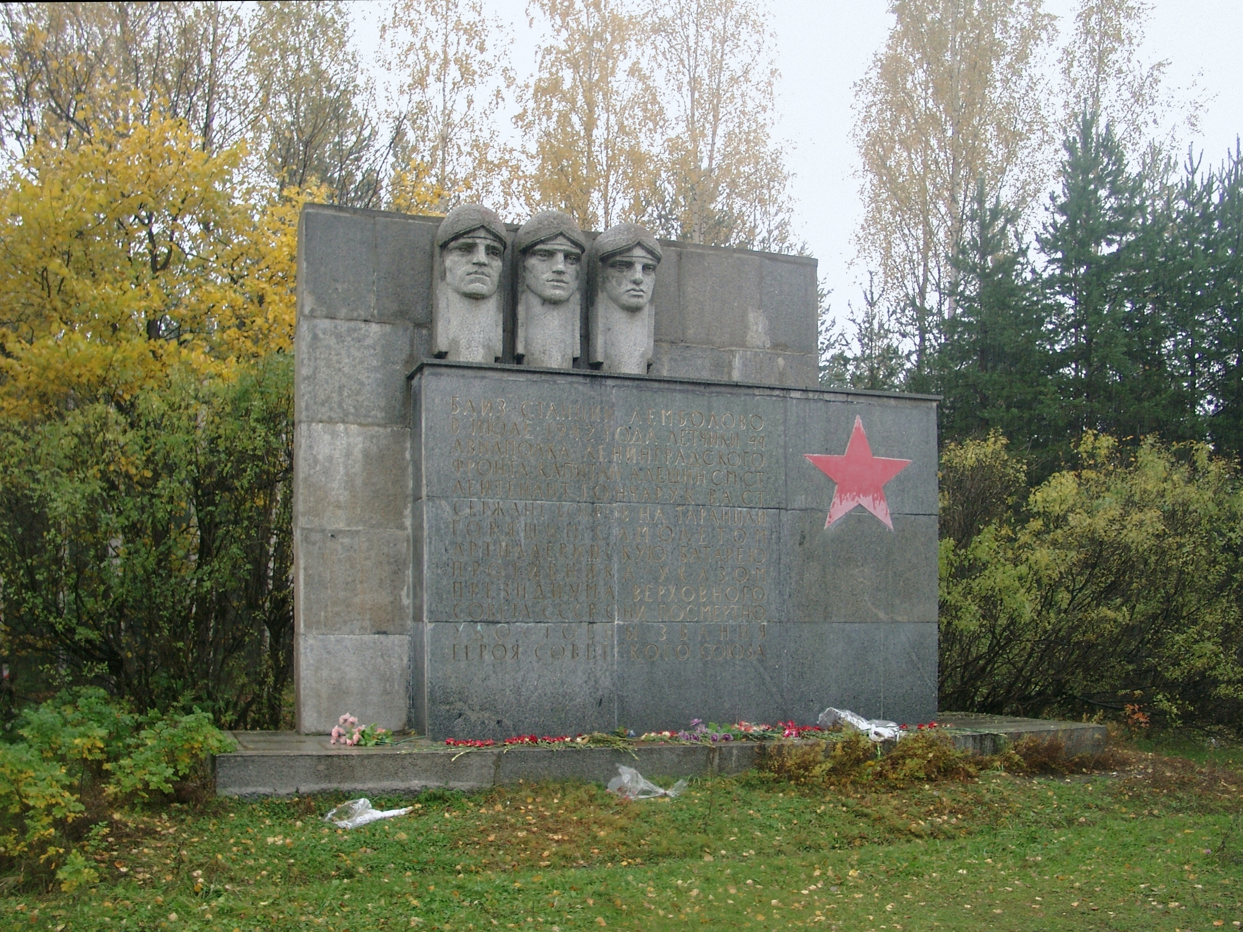 Памятник лётчикам — героям Великой Отечественной войны С. М. Алёшину, Н. А. Боброву и В. А. Гончаруку у платформы Лемболово, Ленинградская область, Россия. Стела в реестре памятников